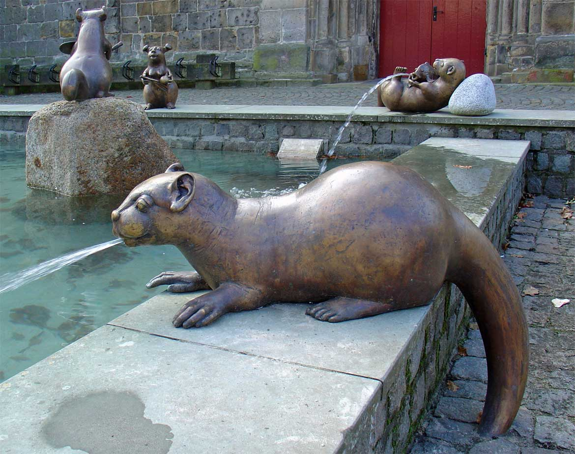 Fontein door Gernot en Barbera Rumpf Ootmarsum 2008